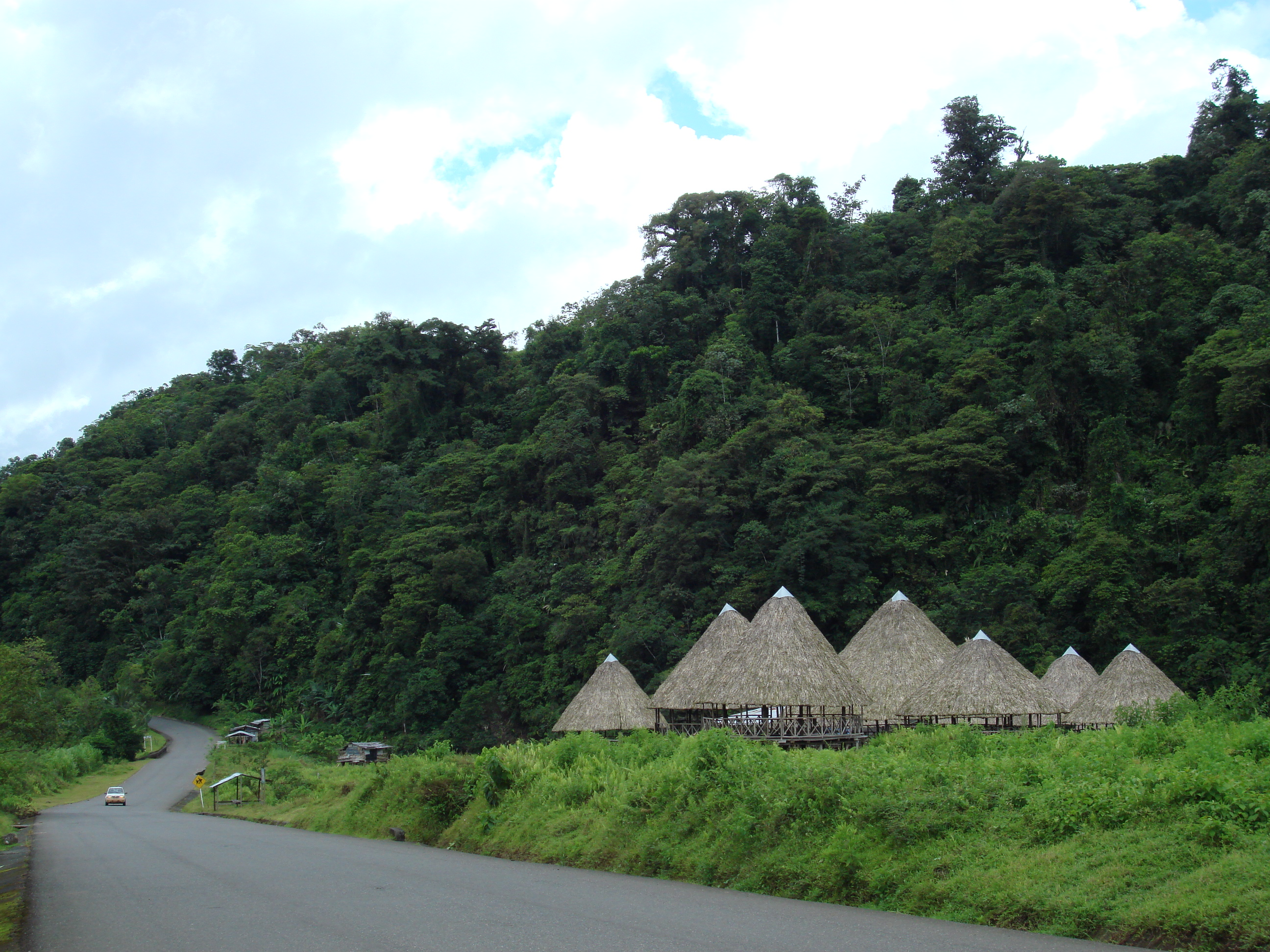 poblado indígena Embera ubicado entre Mutata y Dabeiba Antioquia